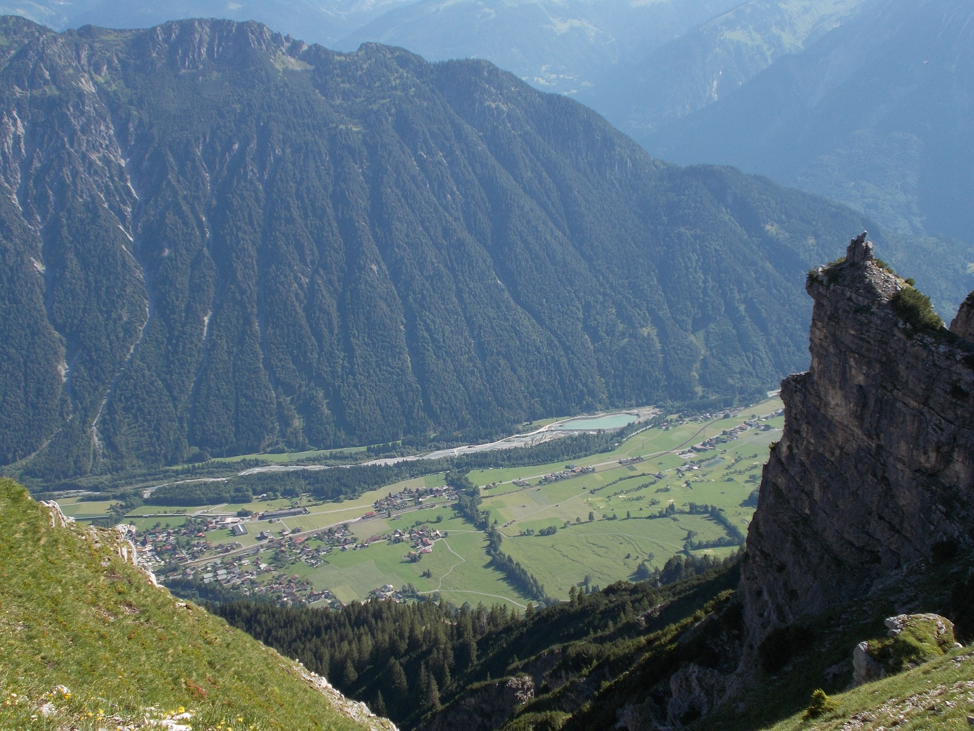 Blick vom Aufstieg auf die Gamsfreiheit (2211 m) ins Klostertal und auf den Speicher Radin des Alfenzkraftwerkes